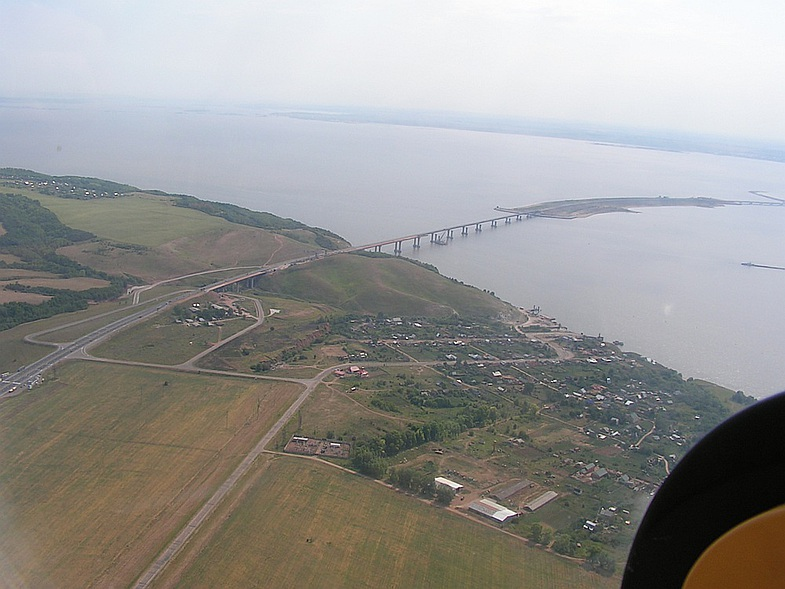 Кама ниже устья Вятки